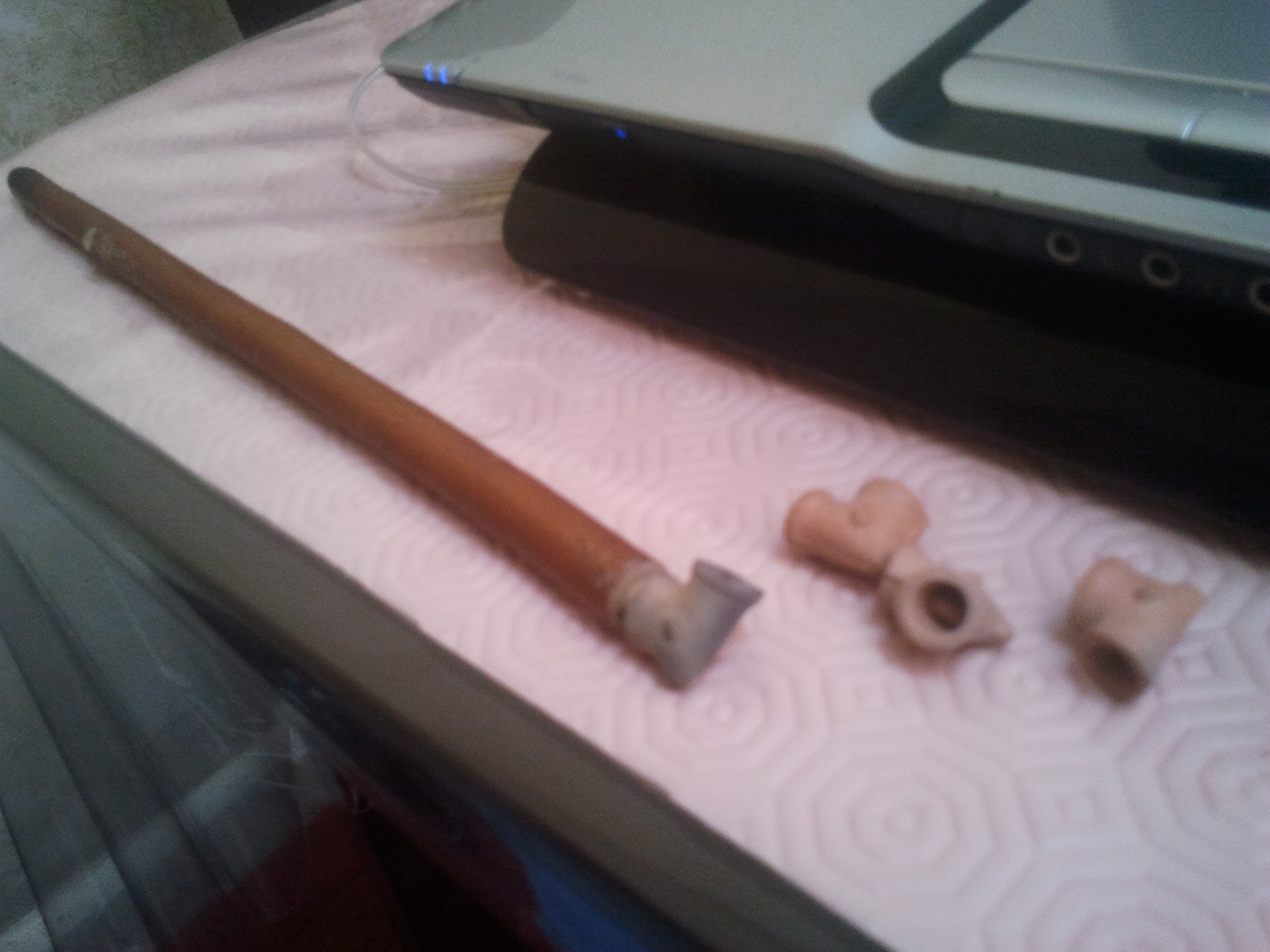 voici un des models de sebse